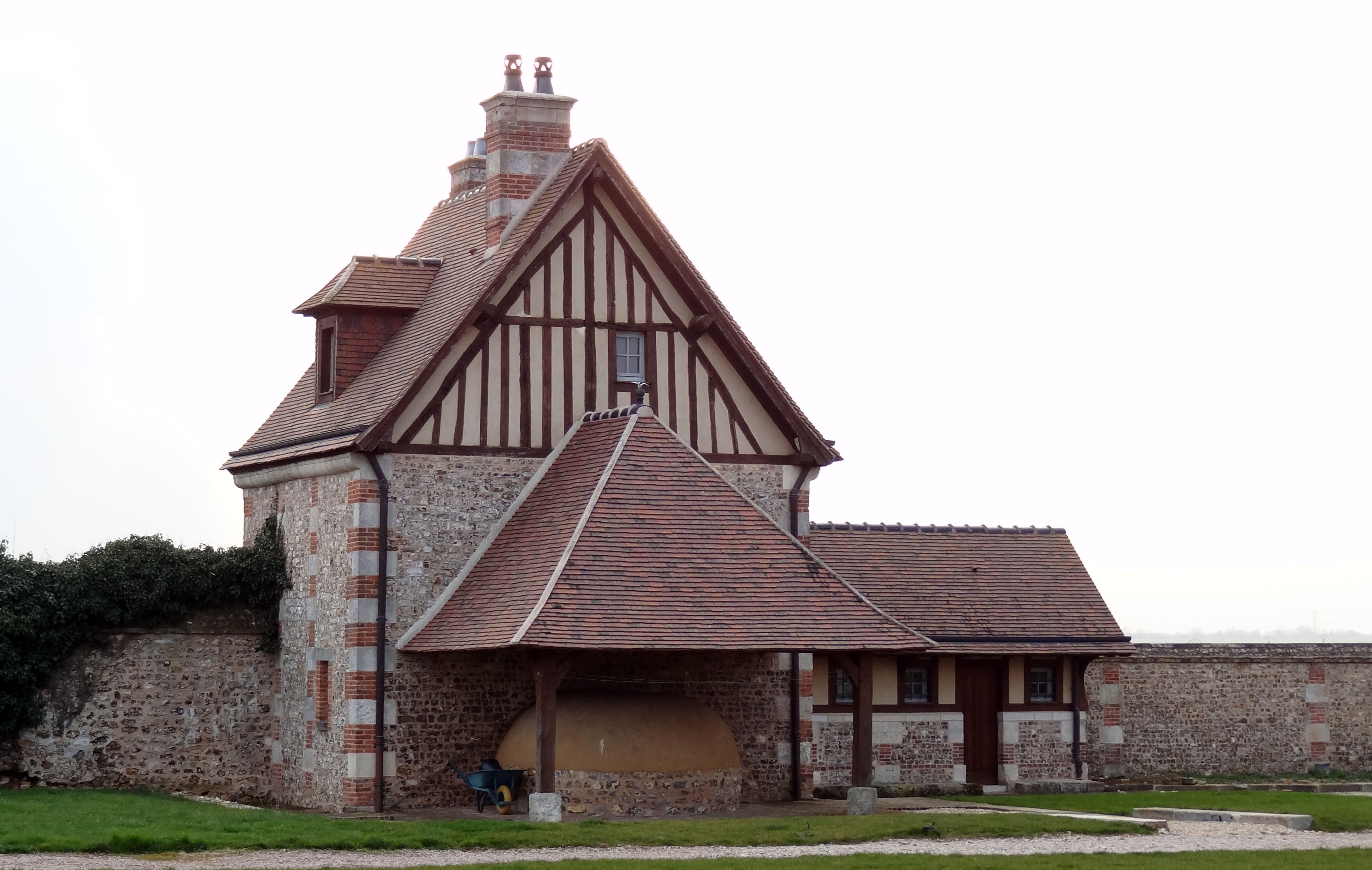 La Commanderie de Saint-Étienne-de-Renneville était une maison Templière prospère au Moyen-Âge. Elle est situé près d'Evreux en Normandie. On y voit le fournil.